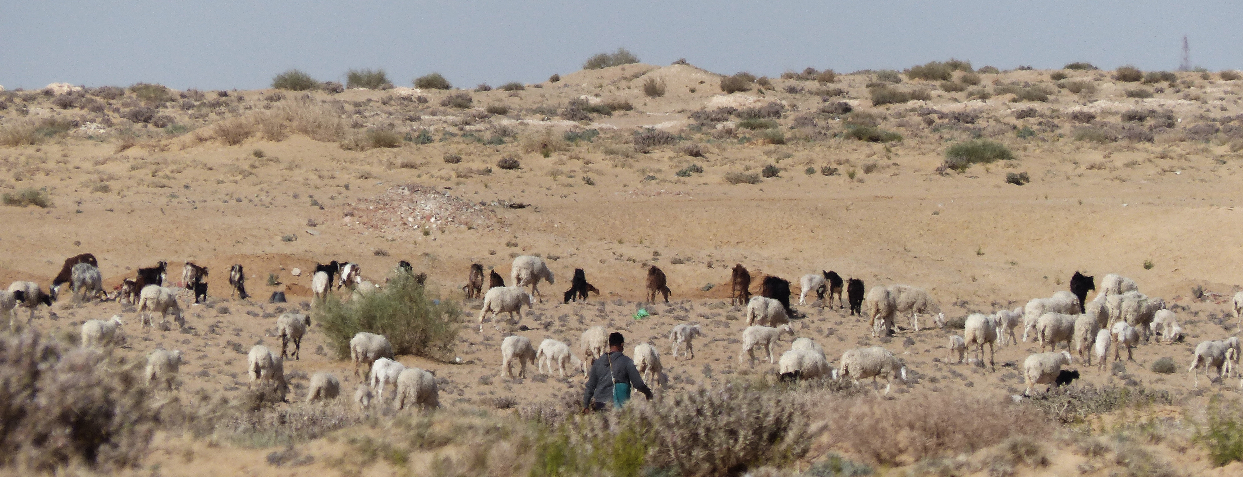 Berger avec son troupeau de moutons et de chèvres près de Tozeur, en Tunisie